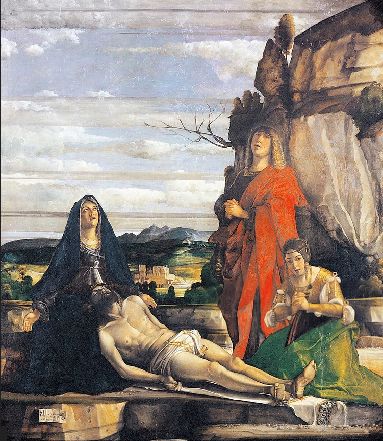 Deposizione nel Sepolcro